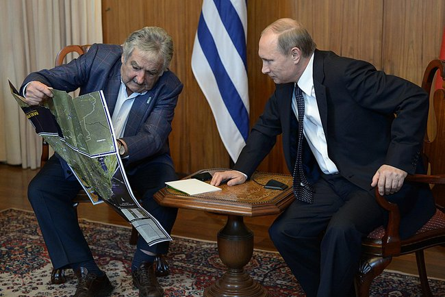 Встреча с Президентом Уругвая Хосе Мухикой